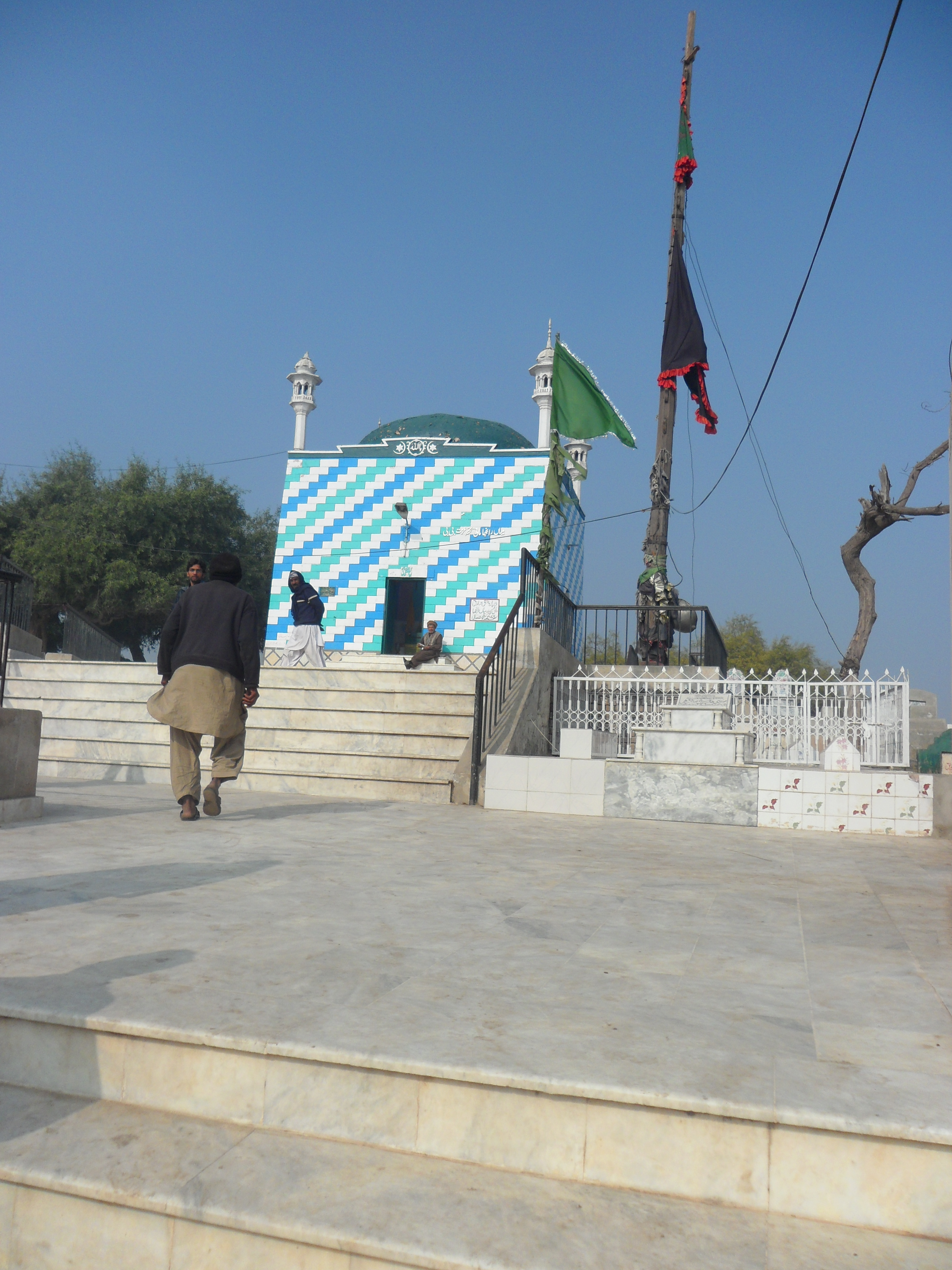 my heer darbar